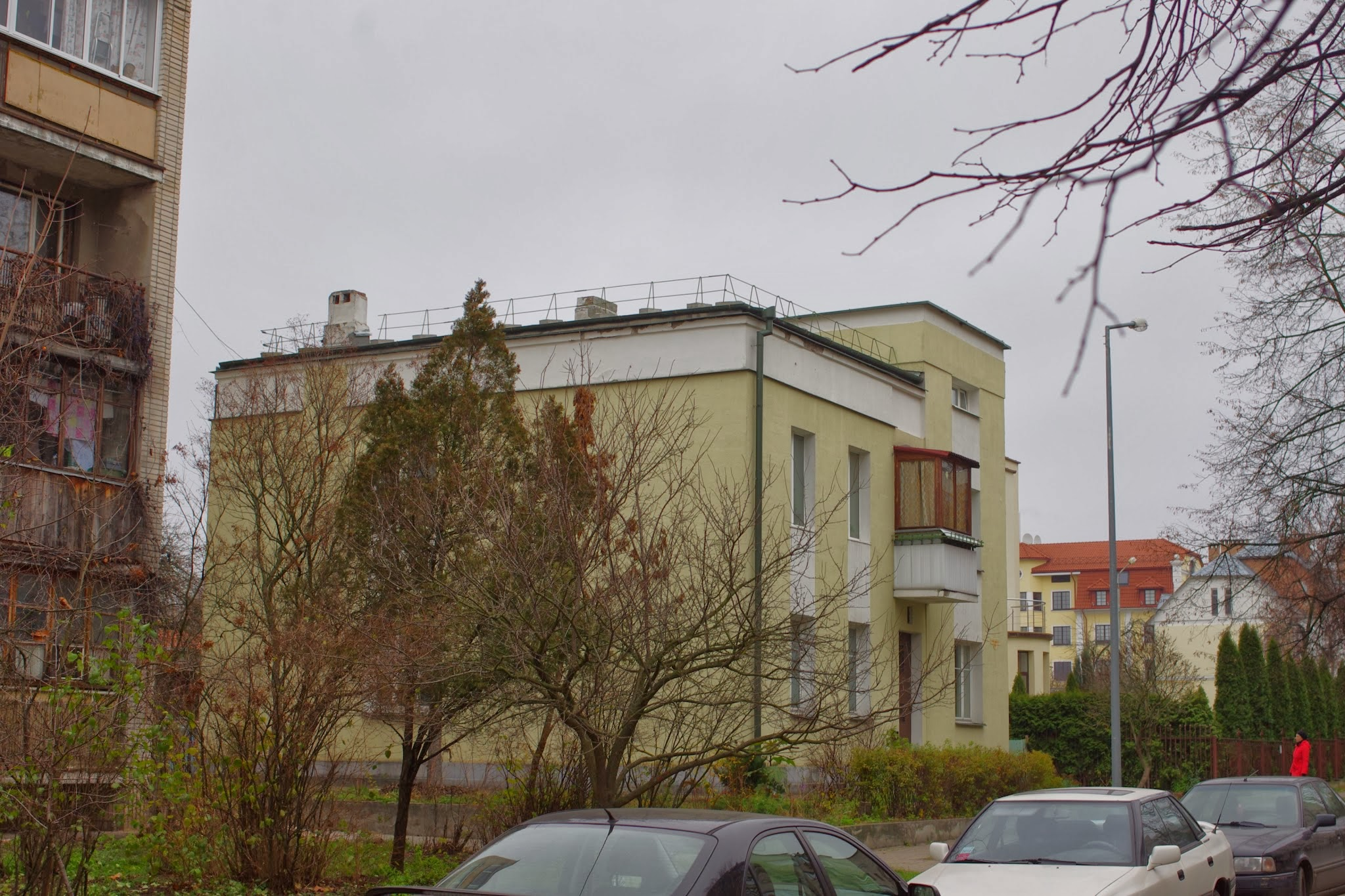 Lieninski rajon, Brest, Belarus